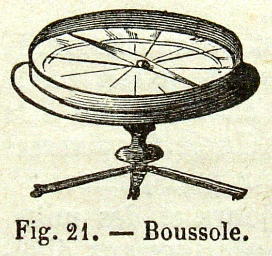 Boussole